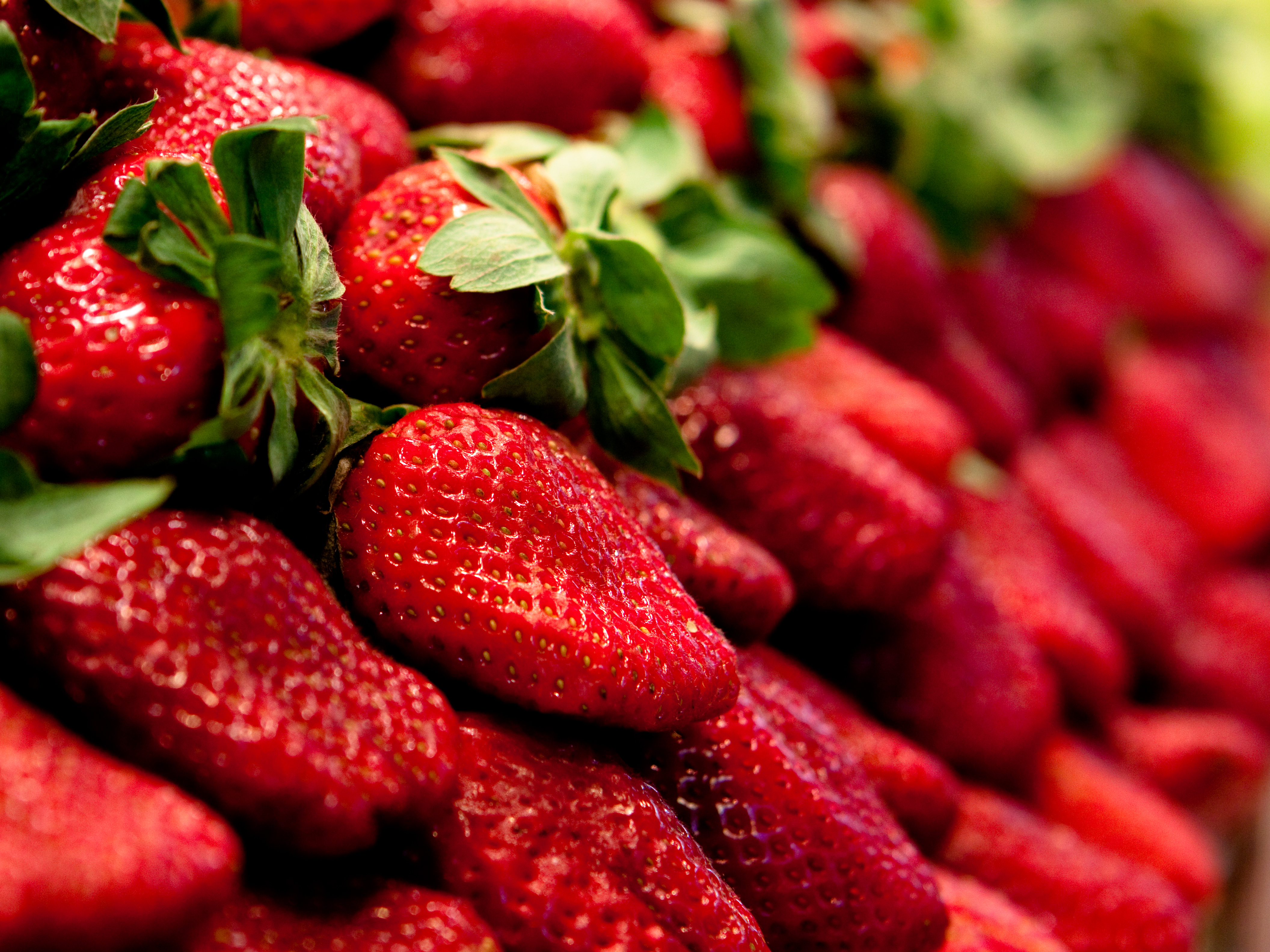 de succulentes fraises bien rouge sur un marché de Barcelone photo publiée ici